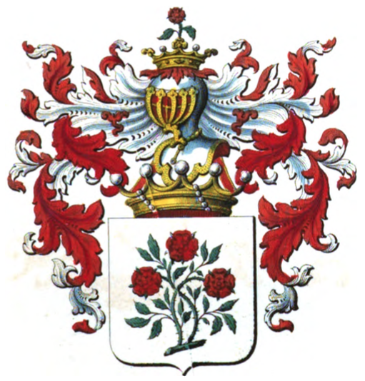 Armes de la famille d'Ancion de Ville